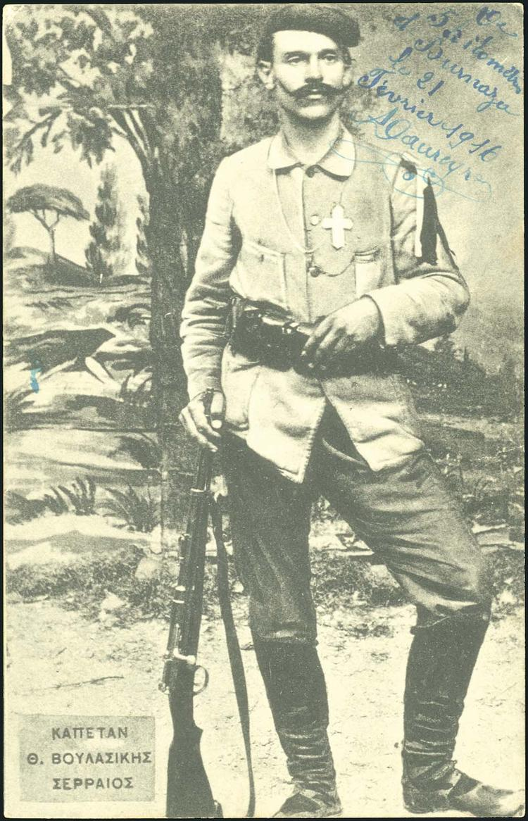 Теодорос Вуласикис.